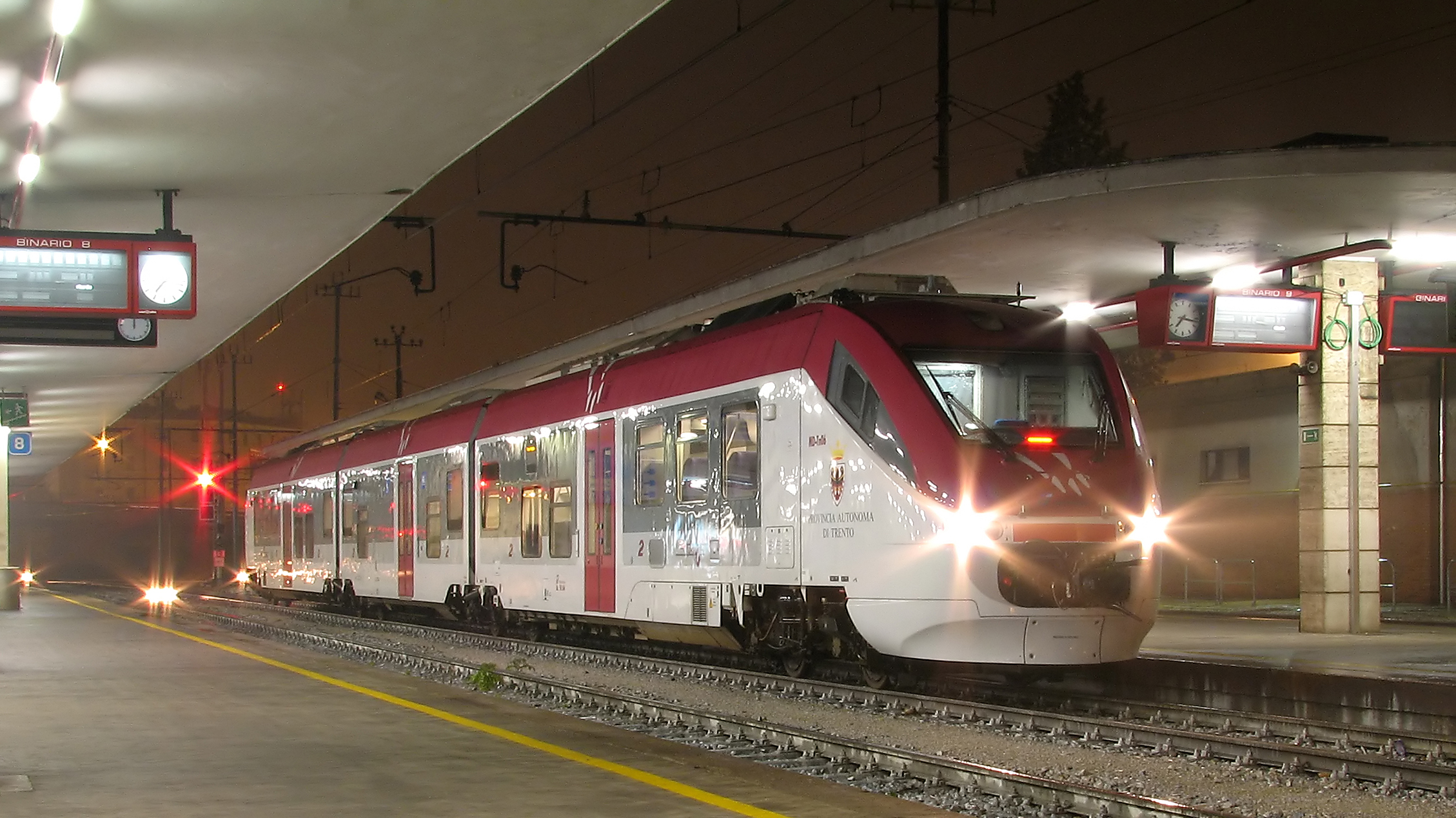 L'Orsetto 06 di Trentino Trasporti è appena giunto a Padova con un Regionale da Bassano del Grappa.